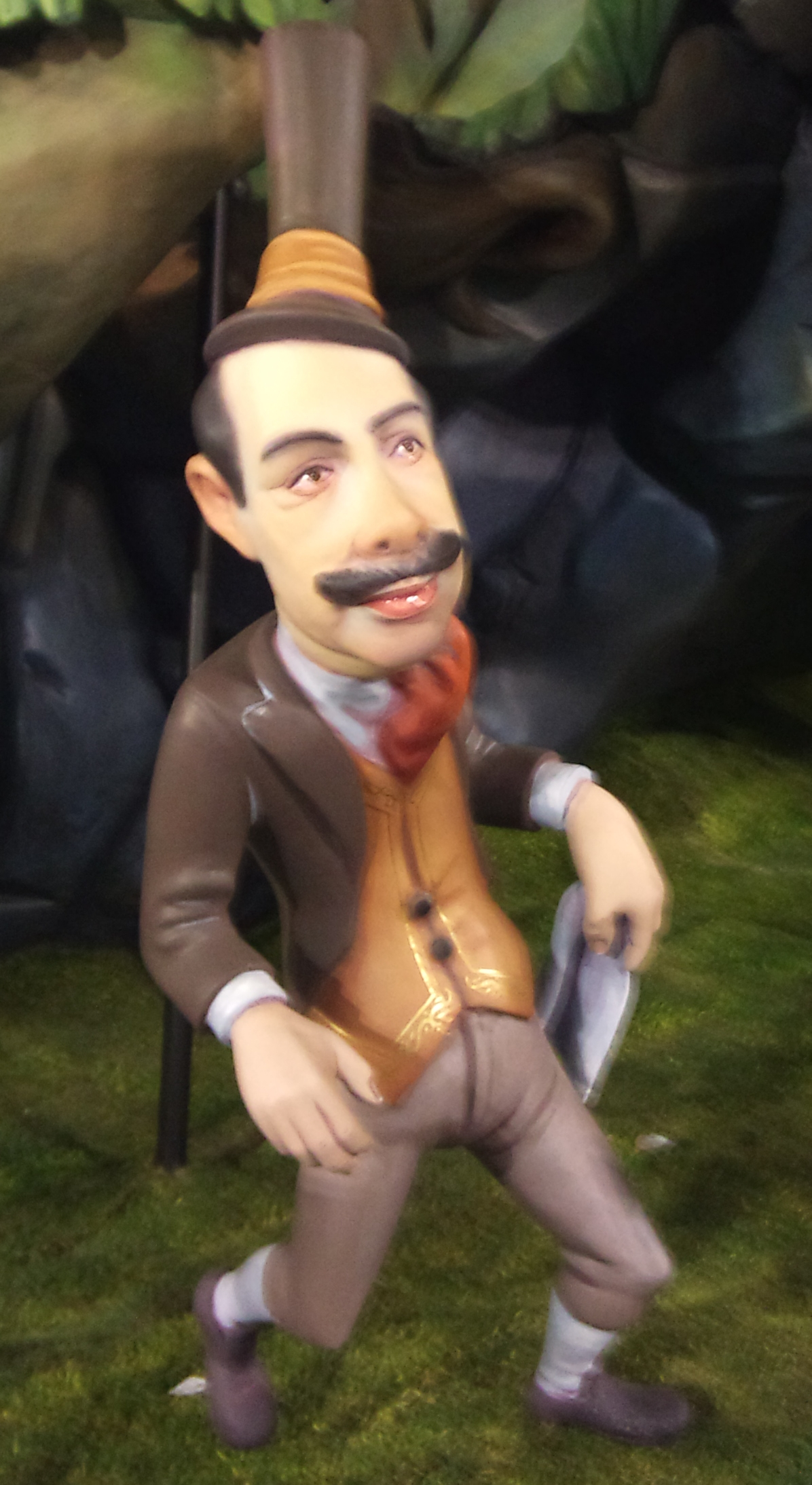 "El bigotes" a la falla Mestre Gozalbo